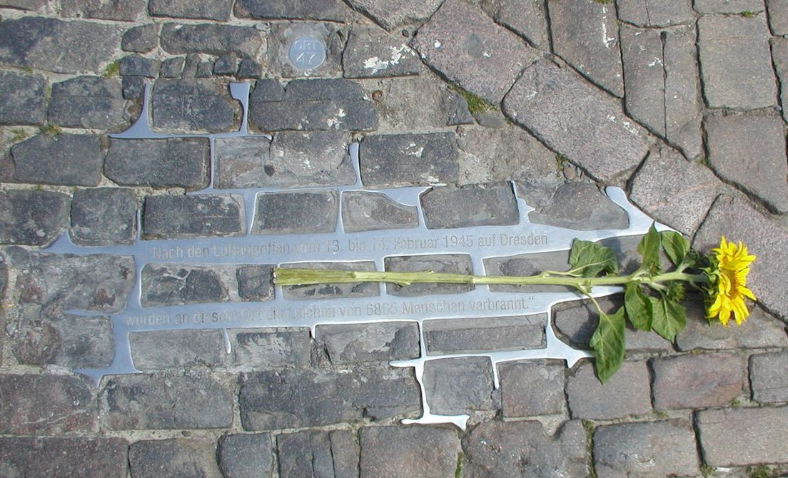 Gedenkstätte (Ort 47) für die Opfer der Luftangriffe auf Dresden vom 13. und 14. Februar 1945. Der Text lautet: „Nach den Luftangriffen vom 13. bis 14. Februar 1945 auf Dresden wurden an diesem Ort die Leichen von 6865 Menschen verbrannt.“